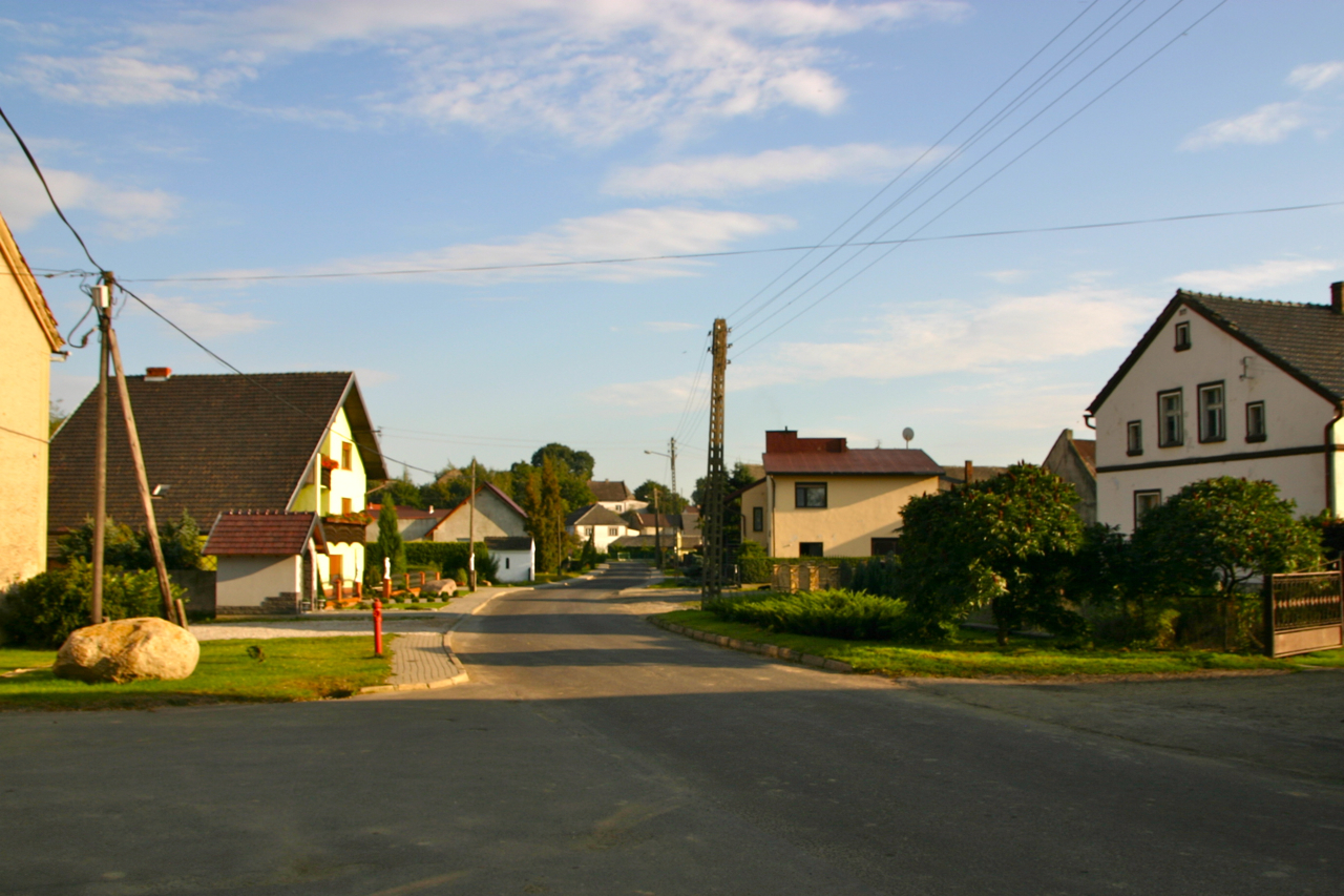 Prężyna (dodatkowa nazwa w j. niem. Groß Pramsen) – wieś w Polsce położona w województwie opolskim, w powiecie prudnickim, w gminie Biała.